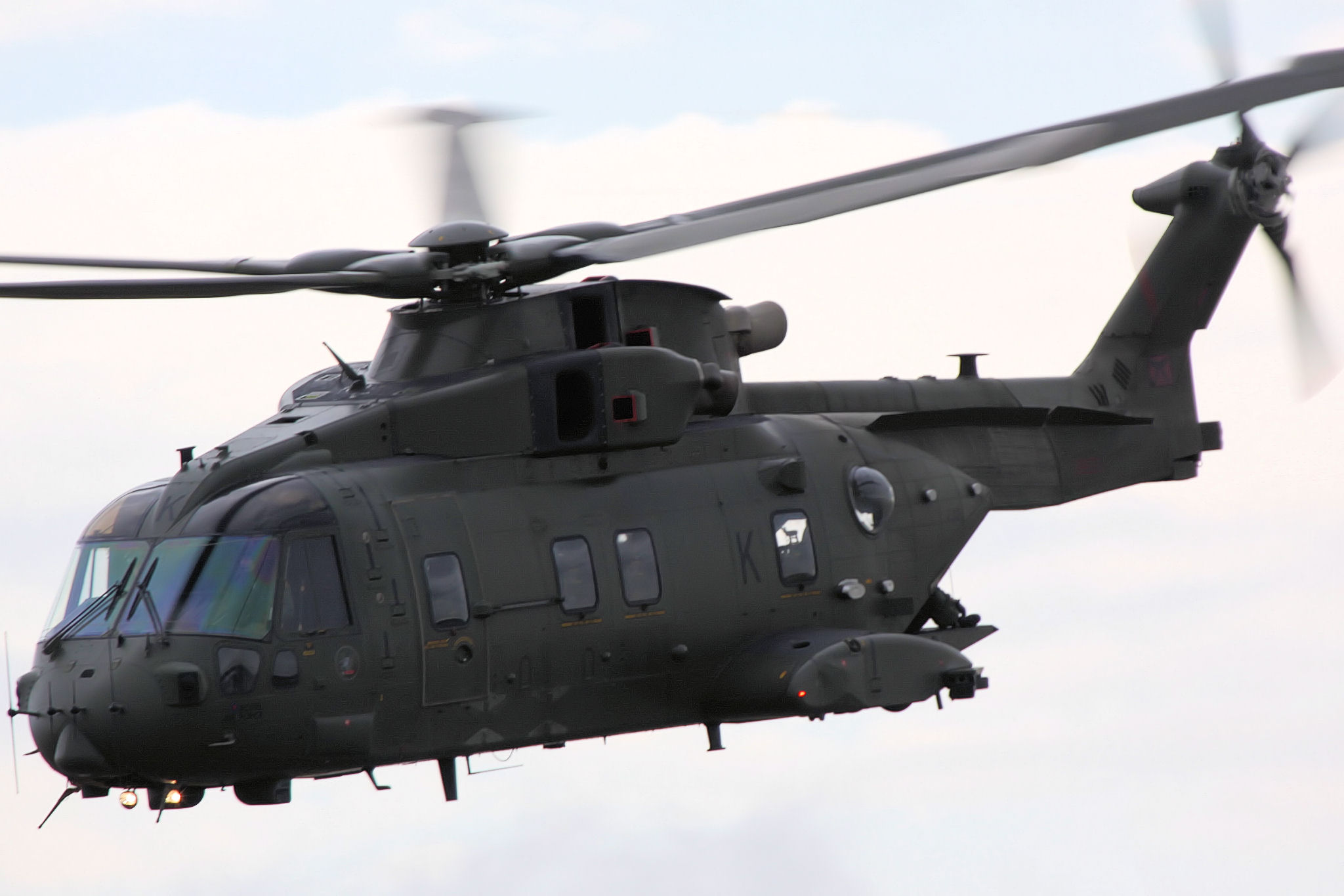 Merlin - RIAT 2009